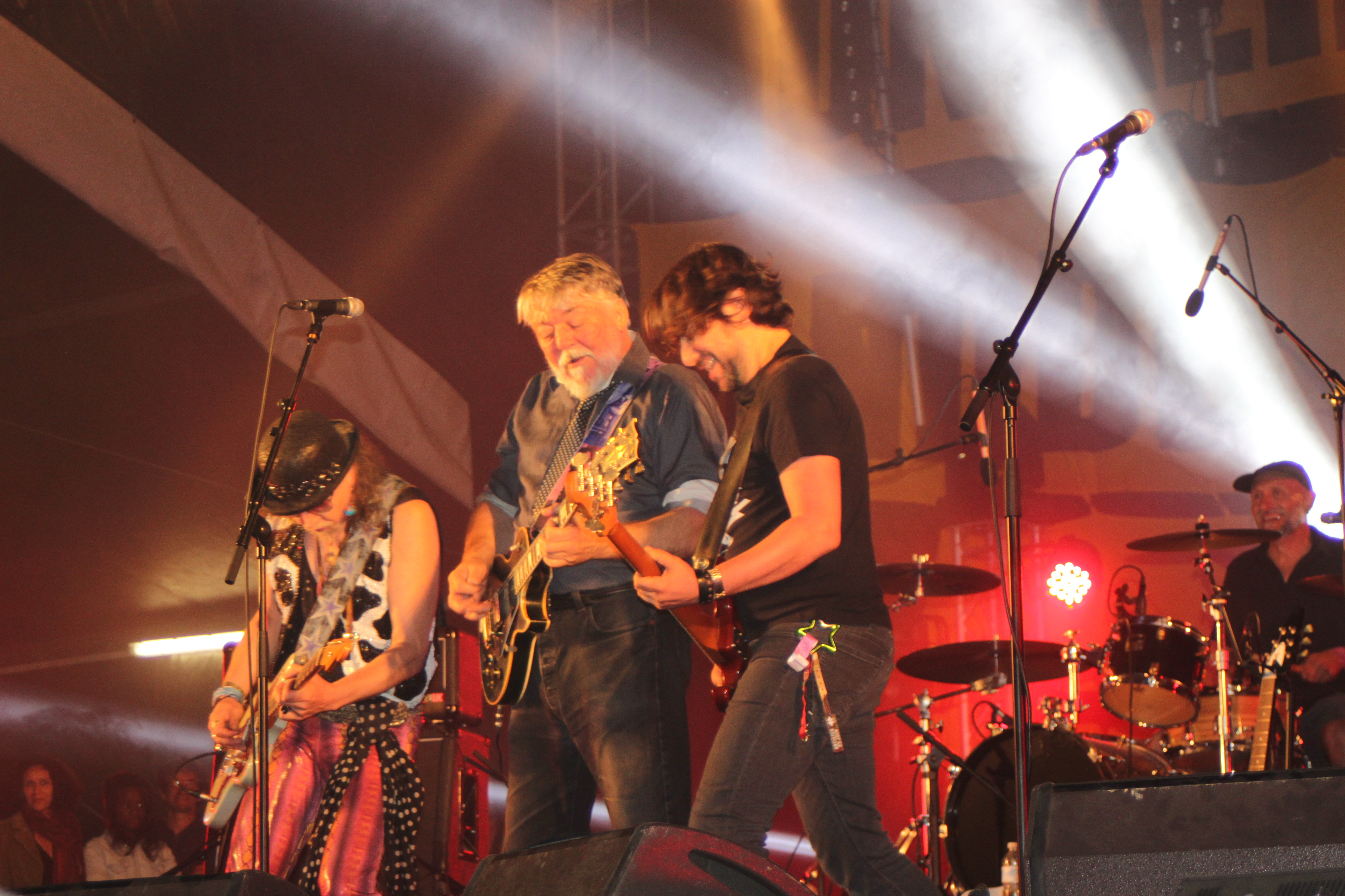 Sven, Stephane Zen et Schultz, Parabellum, à la ZàD, le 4 août 2013, Fr-44-Notre-Dame-des-Landes.